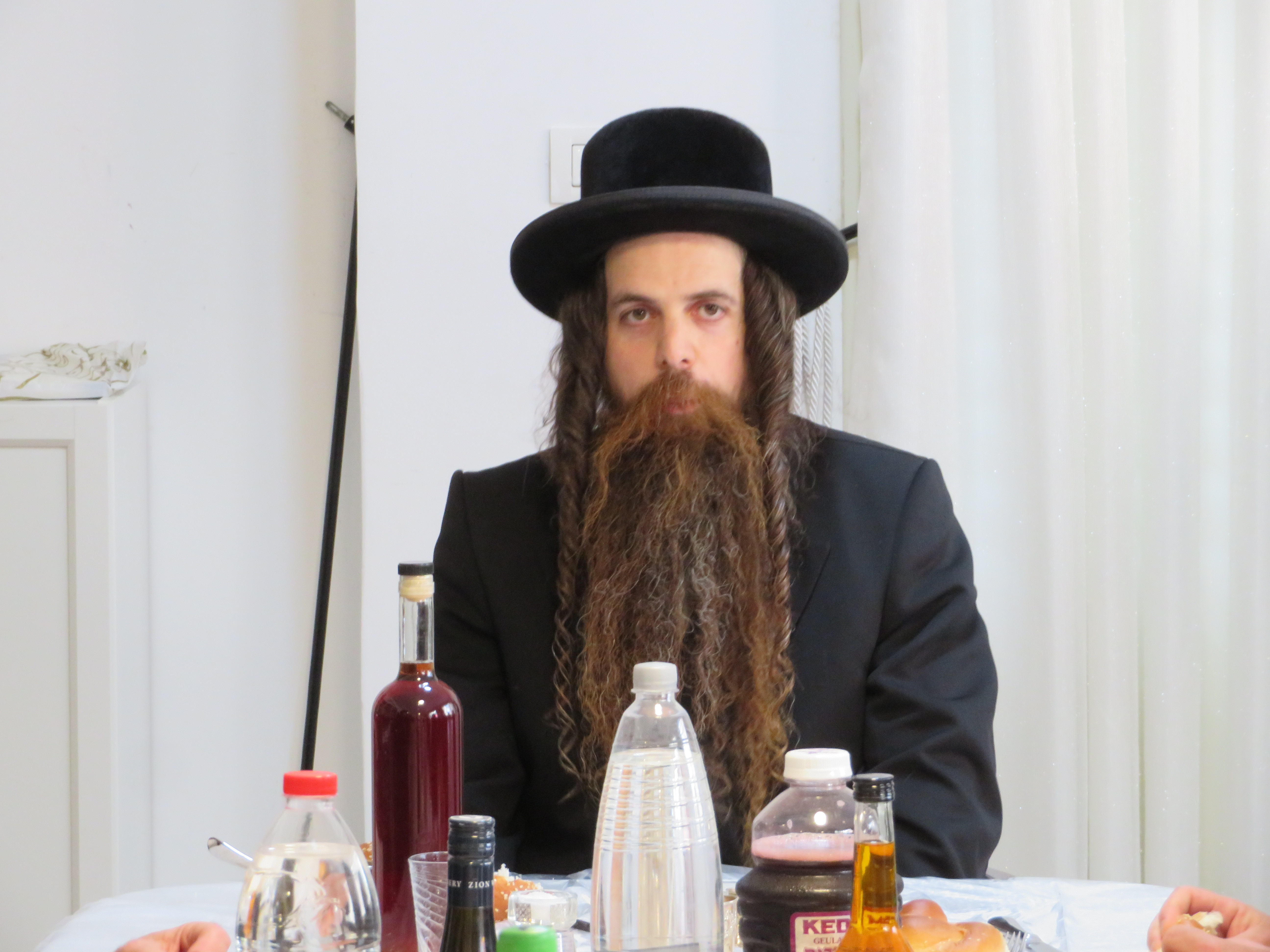 הרב מנחם קאליש, האדמו"ר מאמשינאוו שליט"א טיש ל"ג בעומר תש"פ